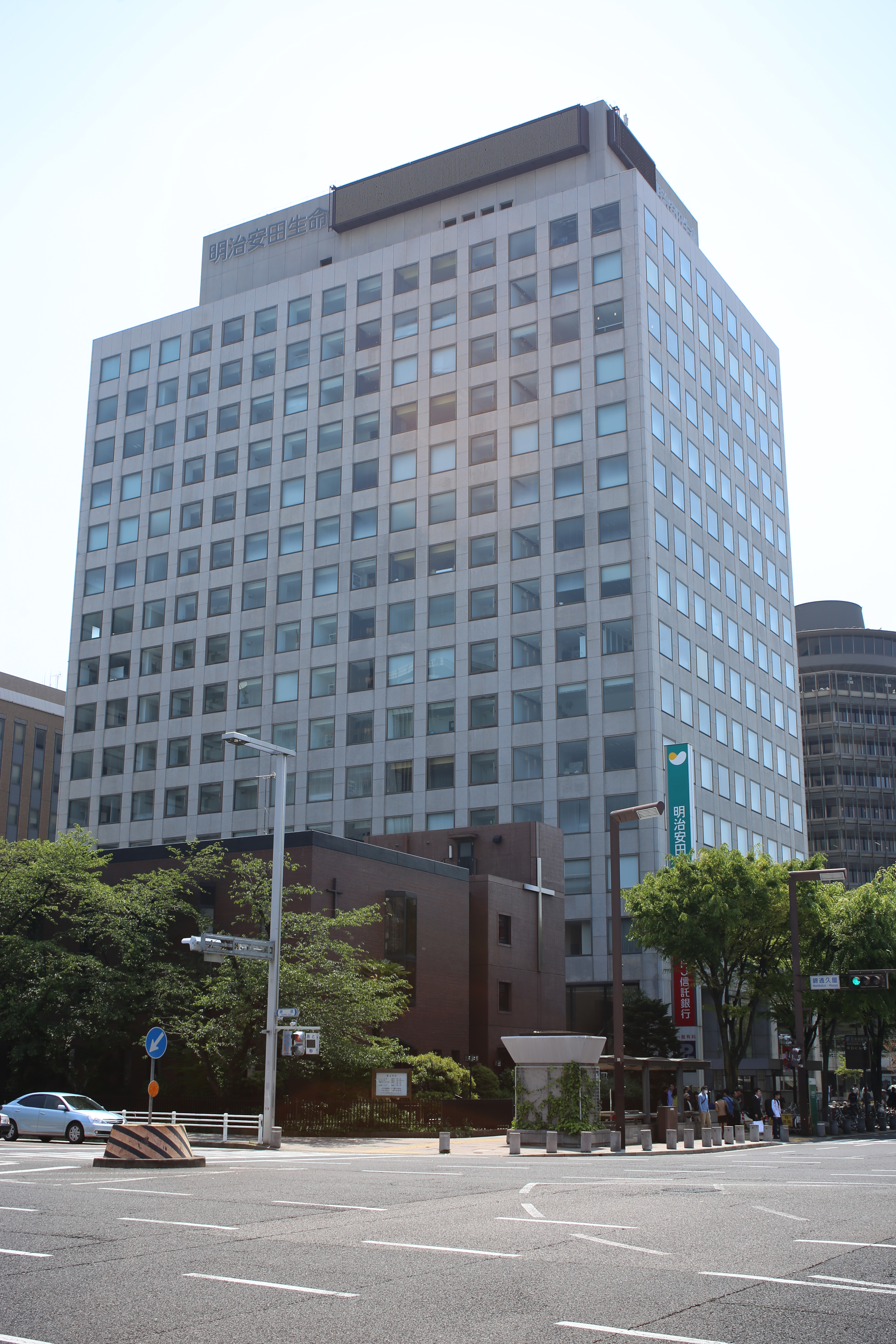 名古屋市中区新栄町1丁目の明治安田生命名古屋ビルを北側公道西側より撮影